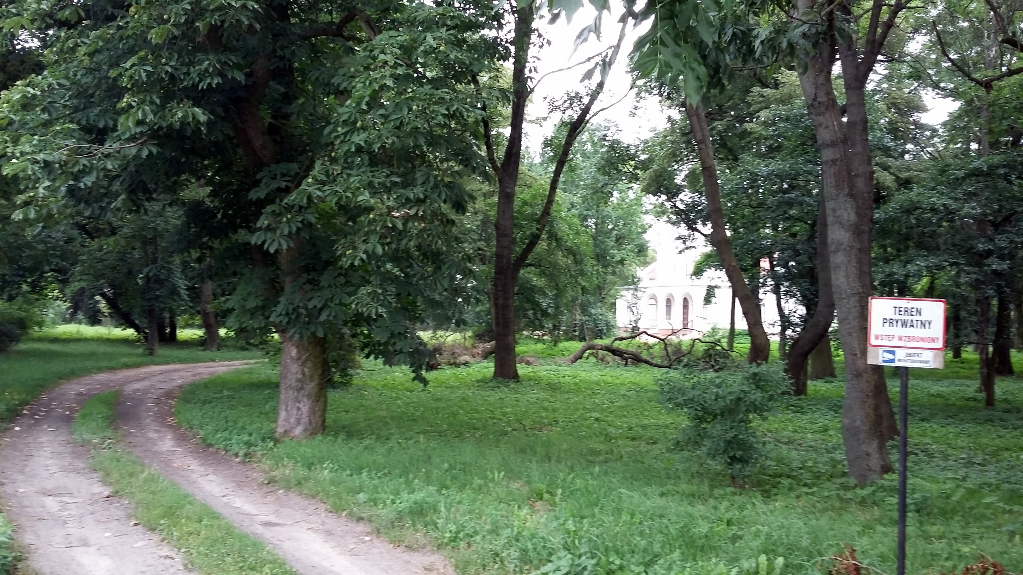 Widok na park i dwór.